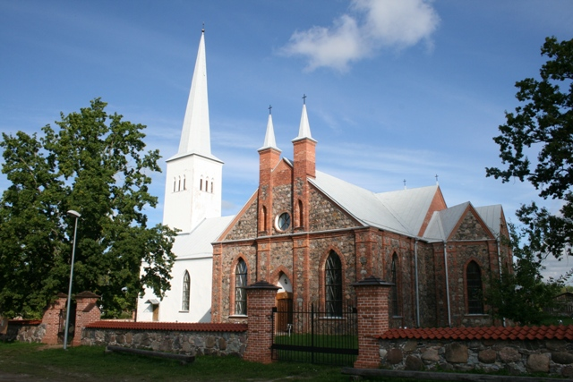 Kambja kirik